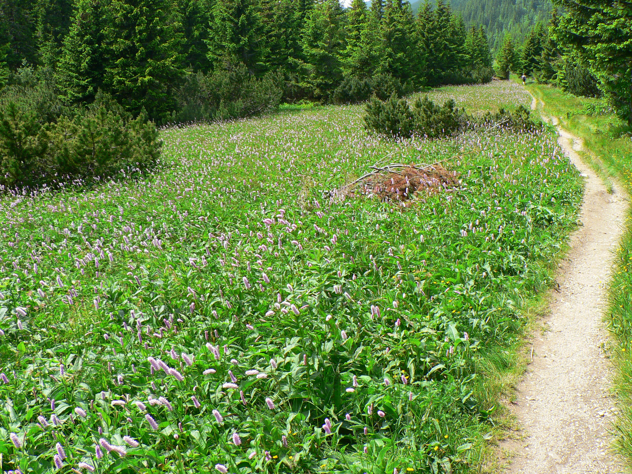 Wspólna Pastwa w Dolinie Kieżmarskiej, południowy skraj